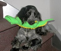 Verkleint en bewerkt detail van afbeelding.